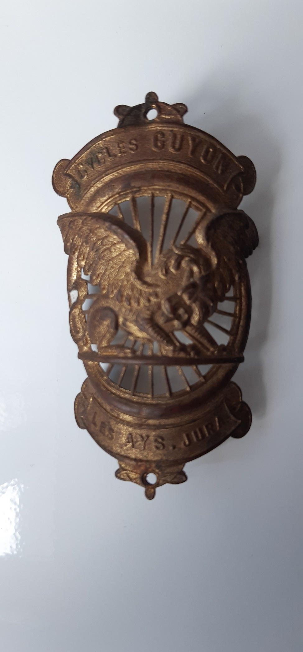 Plaque de vélo. A noter la faute d'orthographe, il manque de "H" dans le nom de la commune !